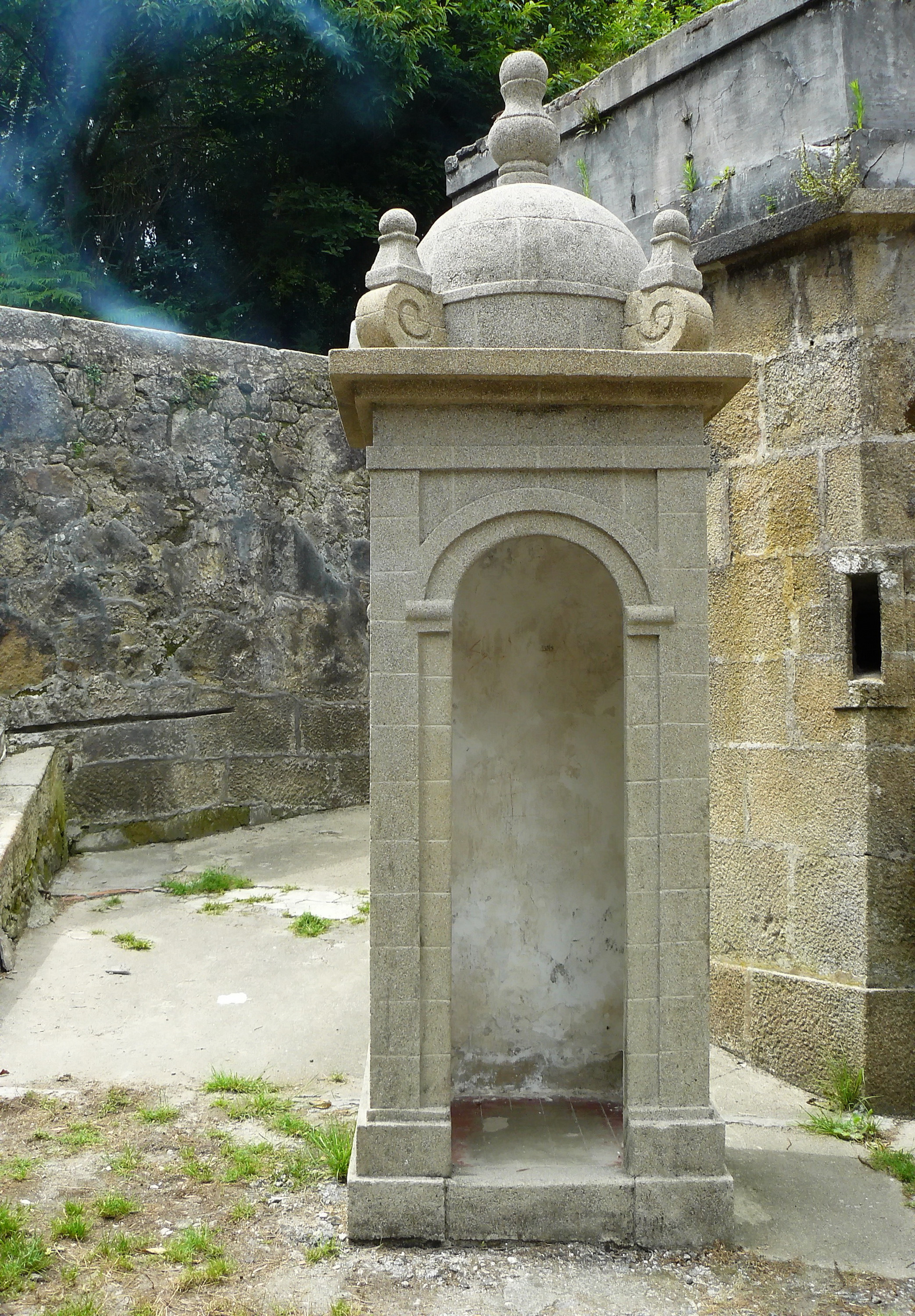 Garita na entrada